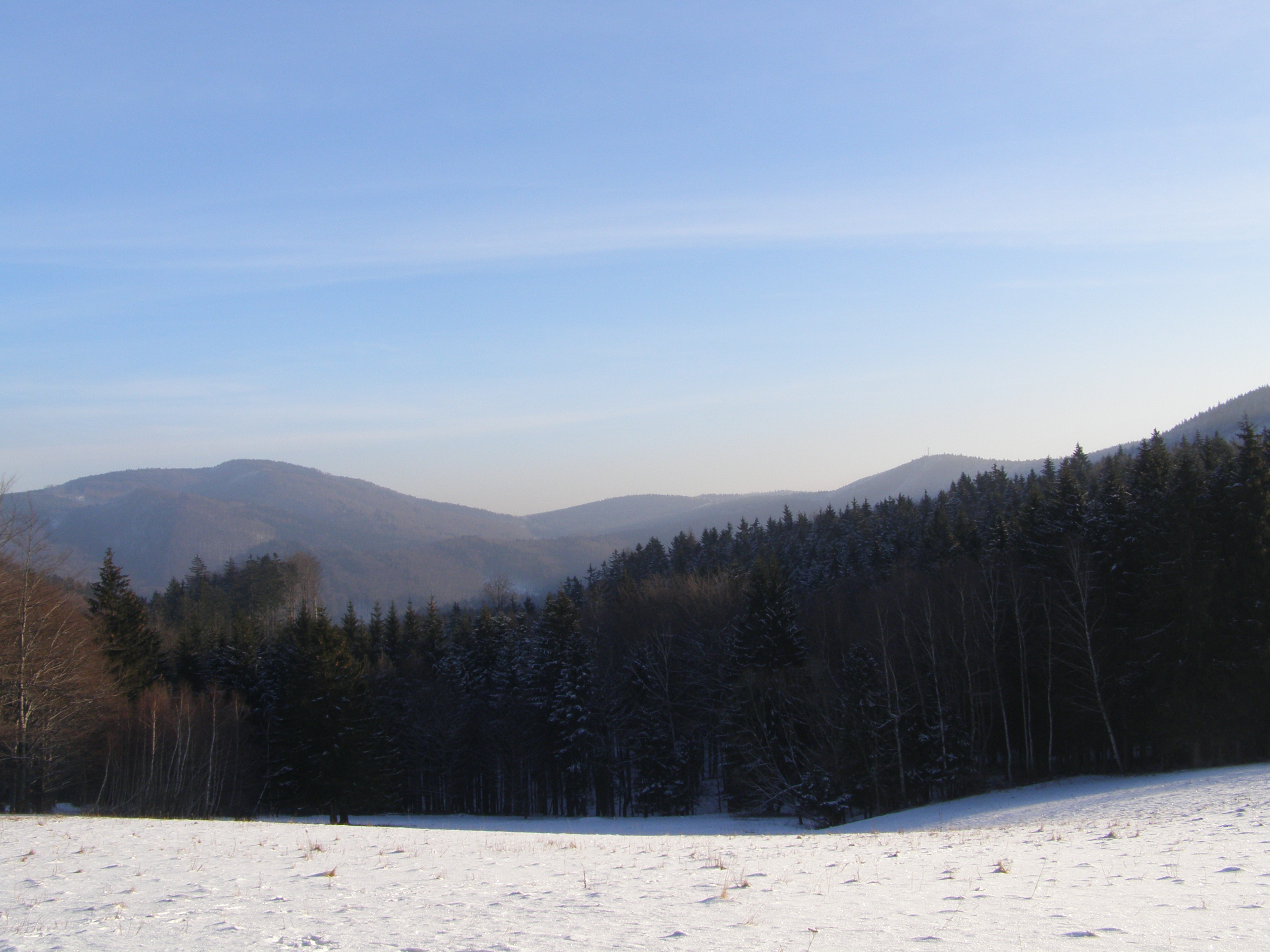 Hostýnské vrchy, Klapinov, výhled na severovýchod